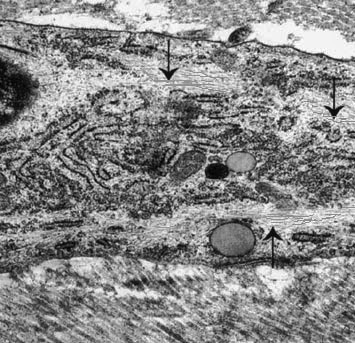 Miofibroblasto, sección a gran aumento. MET. Se observa el núcleo electro-denso a la izquierda. En el sector central de la micrografía, cerca de la membrana plasmática, son visibles las fibras contráctiles (flechas arriba y abajo). En el centro del cuerpo celular se ven: el extenso RER y las mitocondrias.